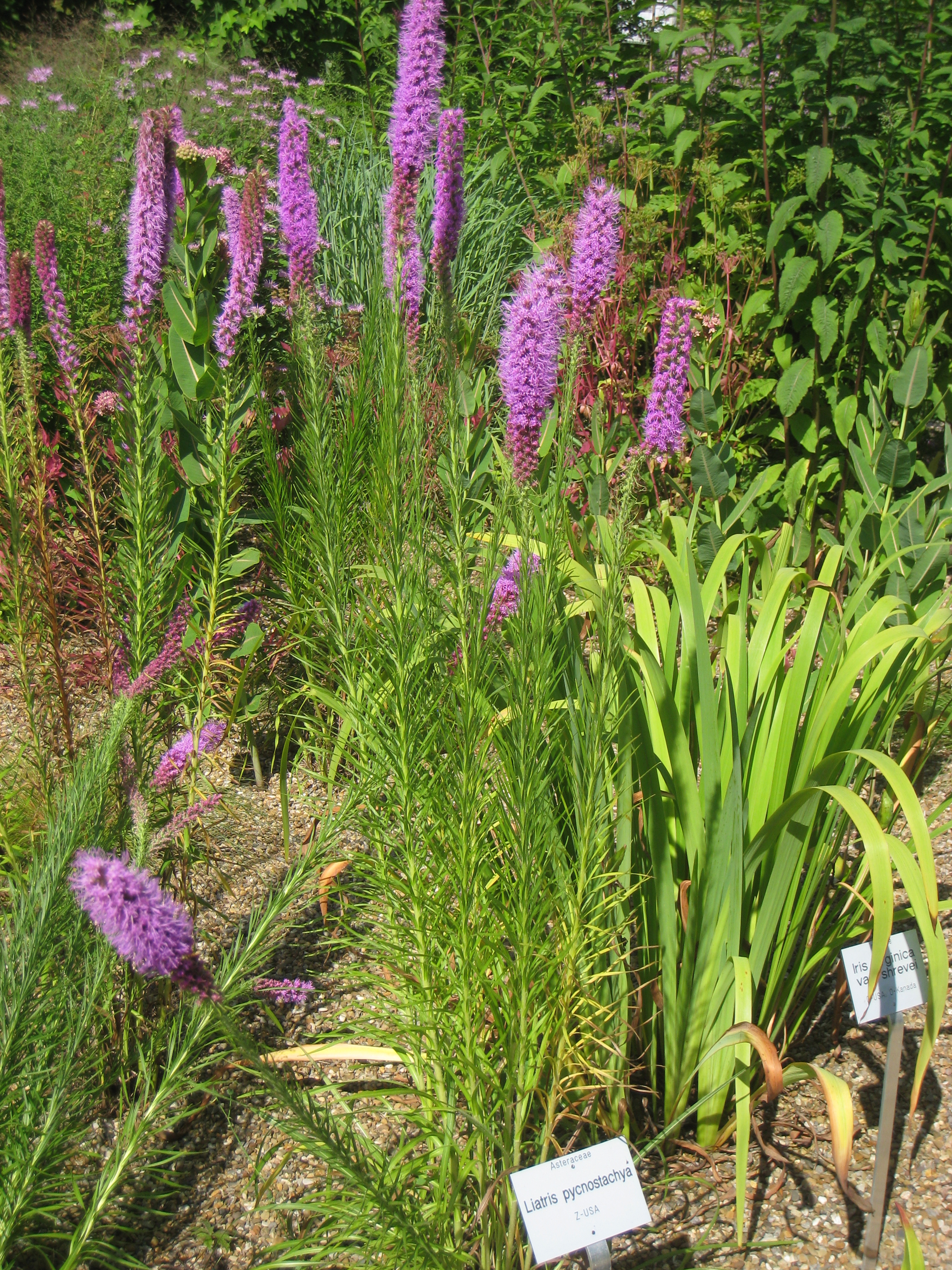 Liatris pycnostachya in the Botanischer Garten der Universität Würzburg, Würzburg, Germany.